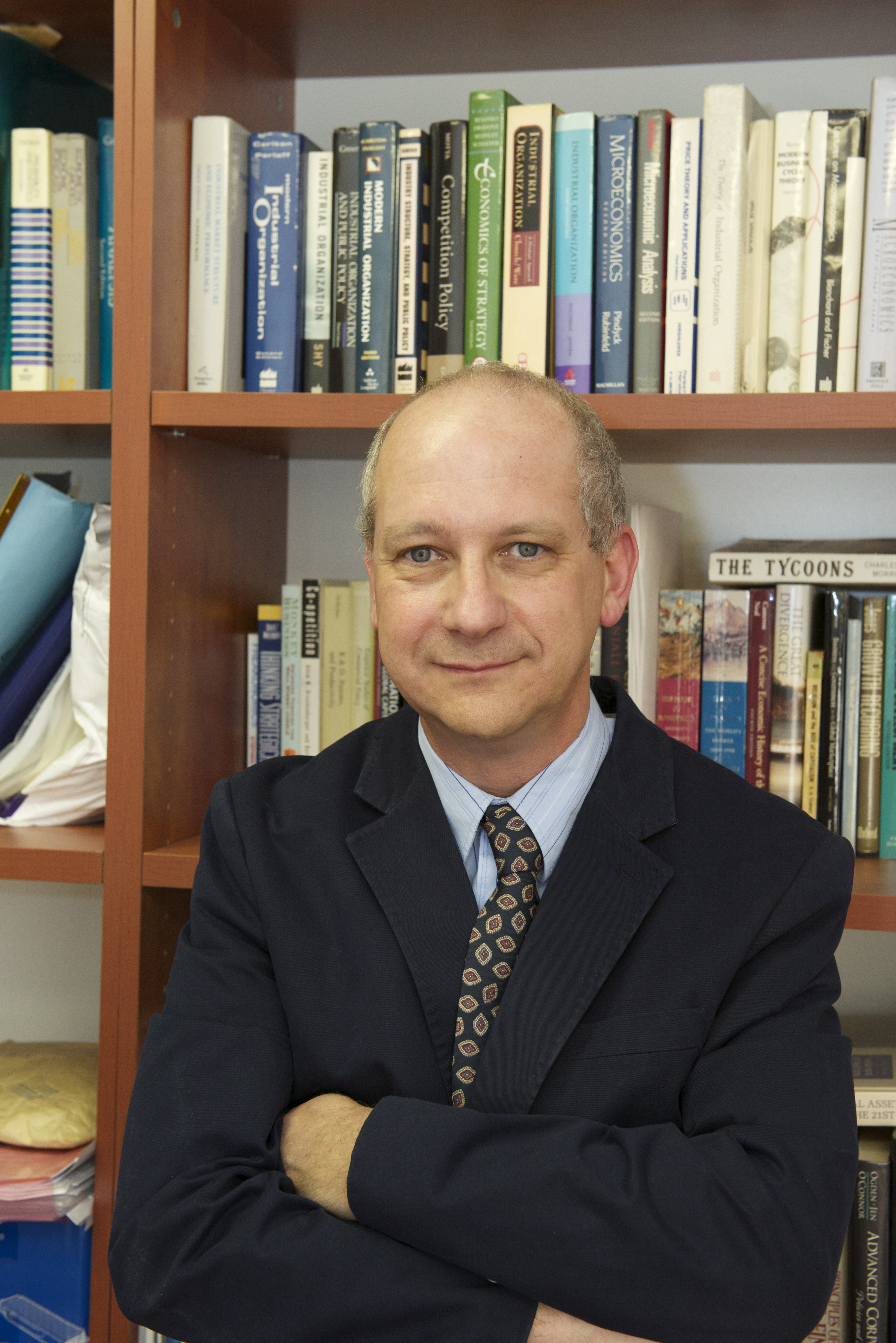 תמונתו של פרופסור ישי יפה, כלכלן ופרופסור למימון בבית הספר למנהל עסקים באוניברסיטה העברית בירושלים